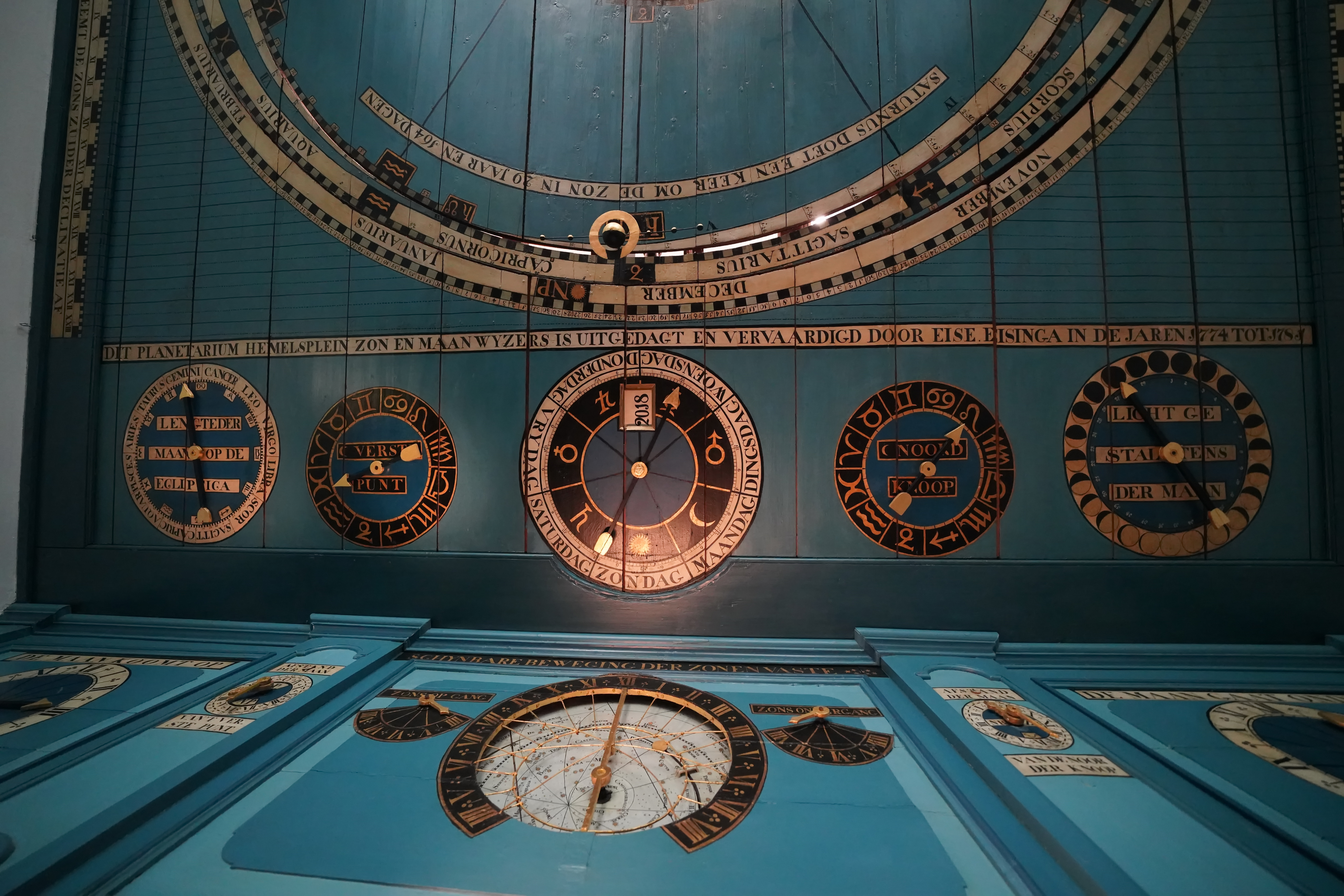 Eise Eisinga Planetarium in Franeker